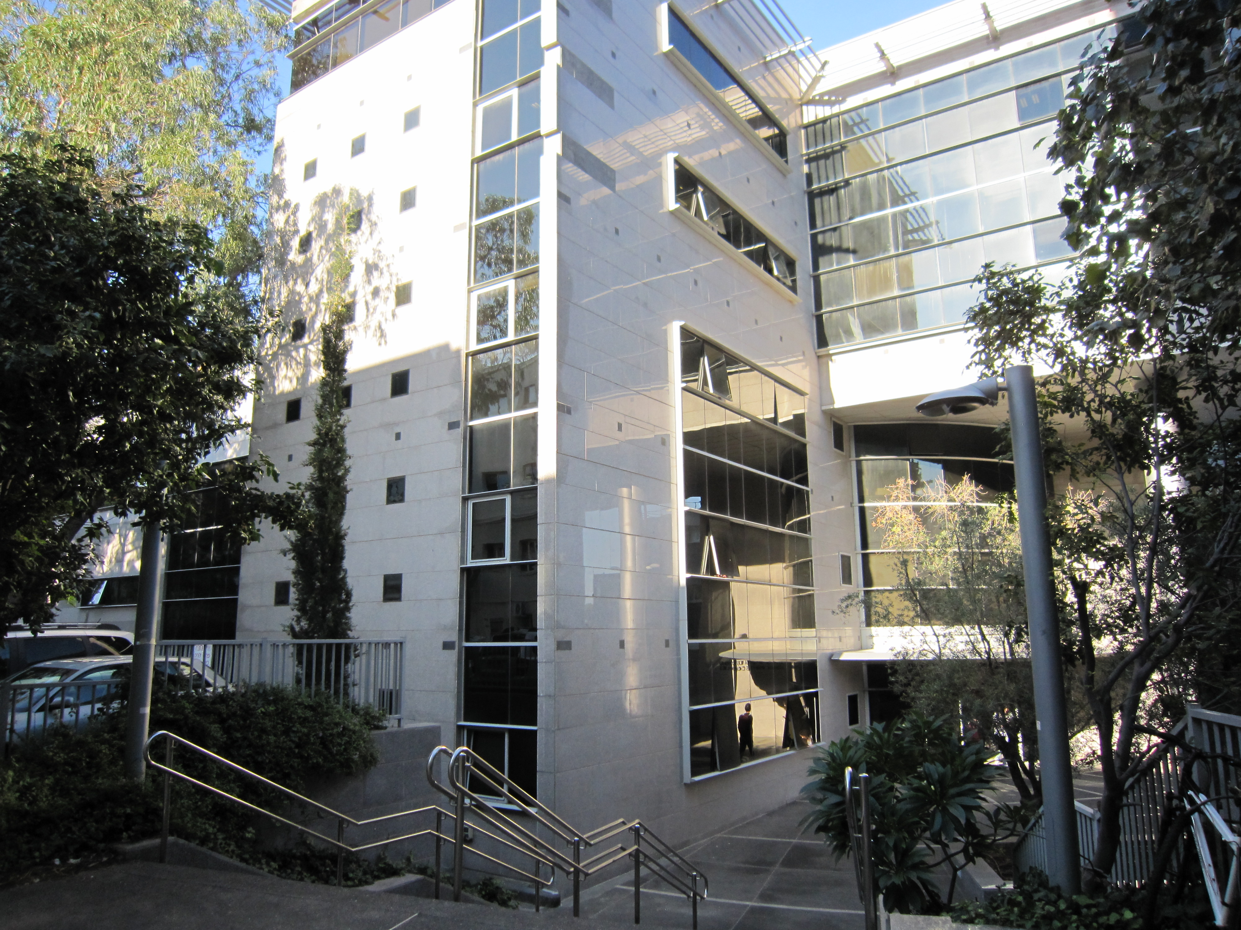 בנין הפקולטה לפיזיקה